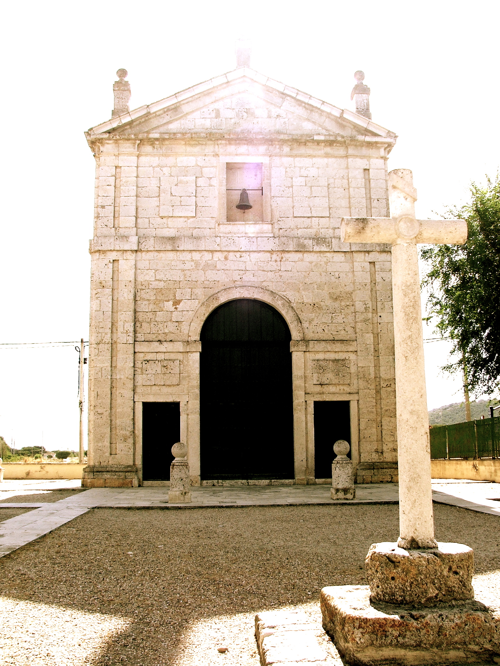 Ermita del Humilladero de la Quinta Angustia de Tudela de Duero (España)